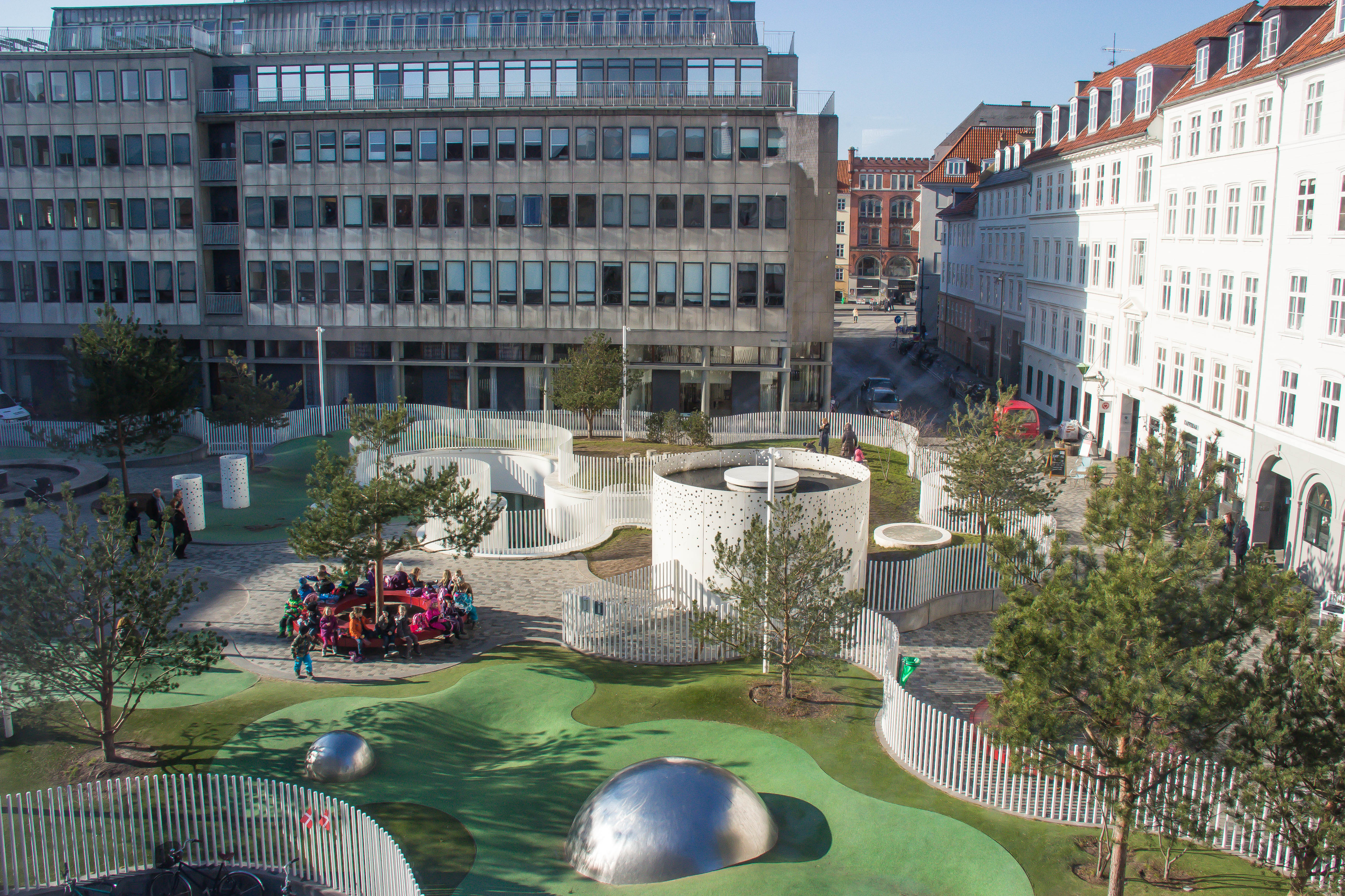 Hauser Plads in Copenhagen, Denmark